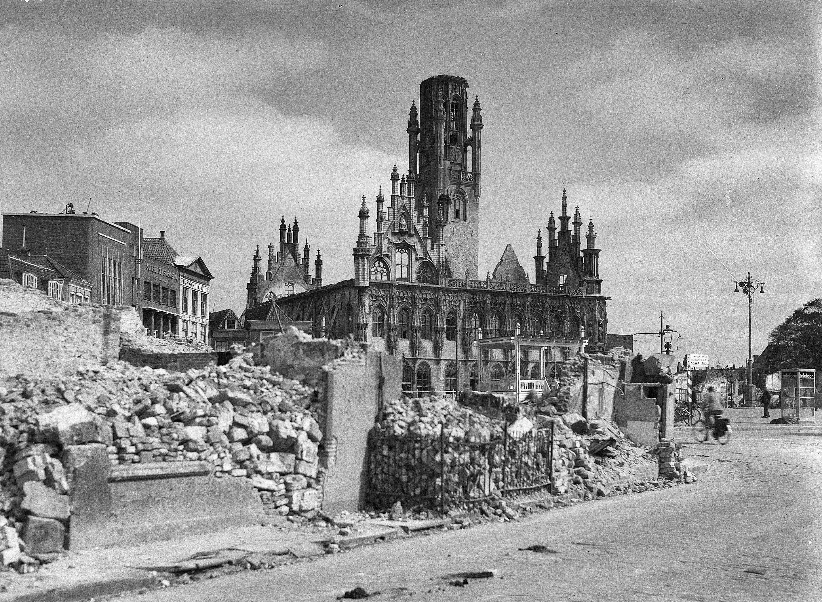 Stadhuis: na de verwoesting